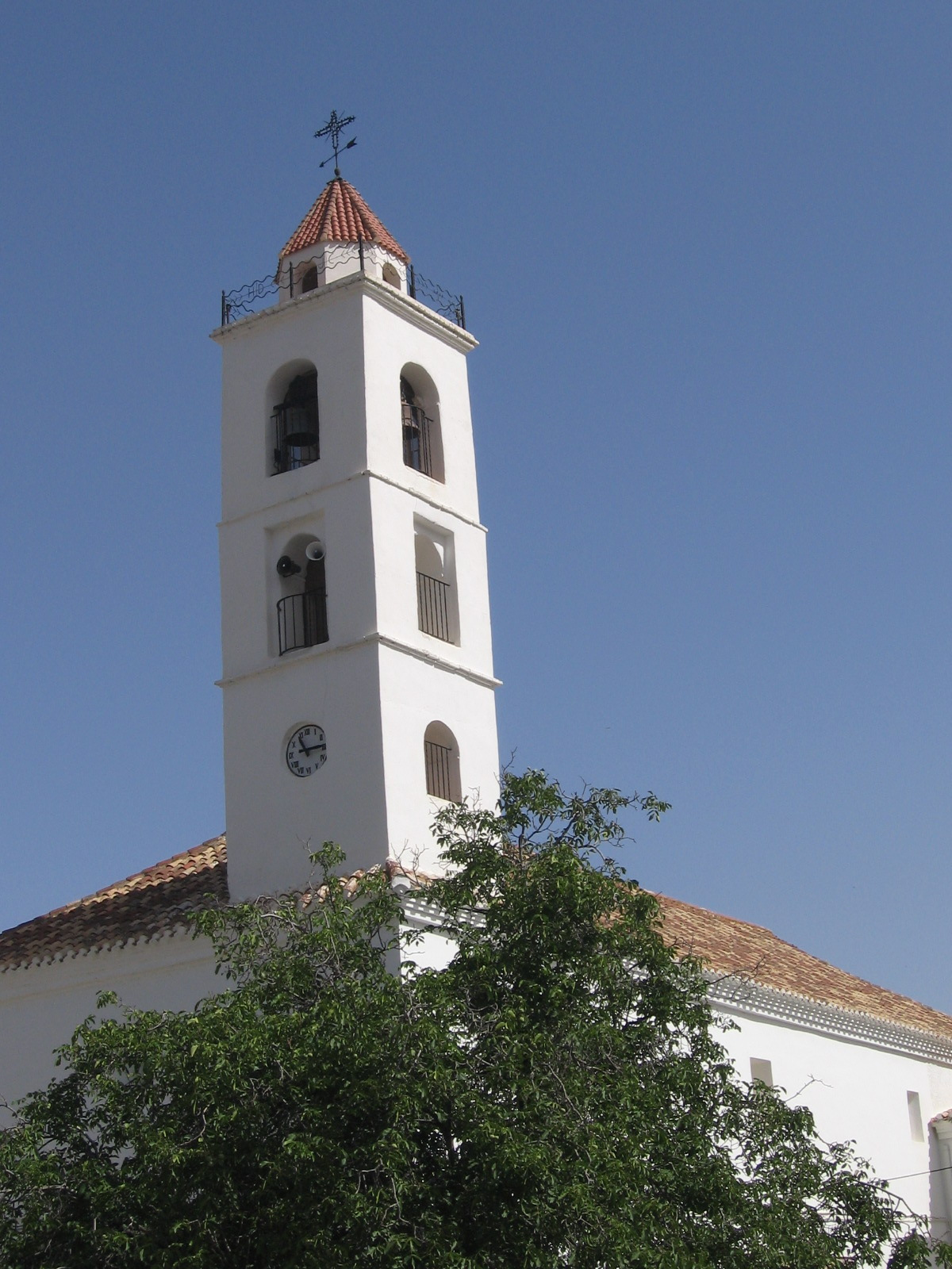 Bacares, España.